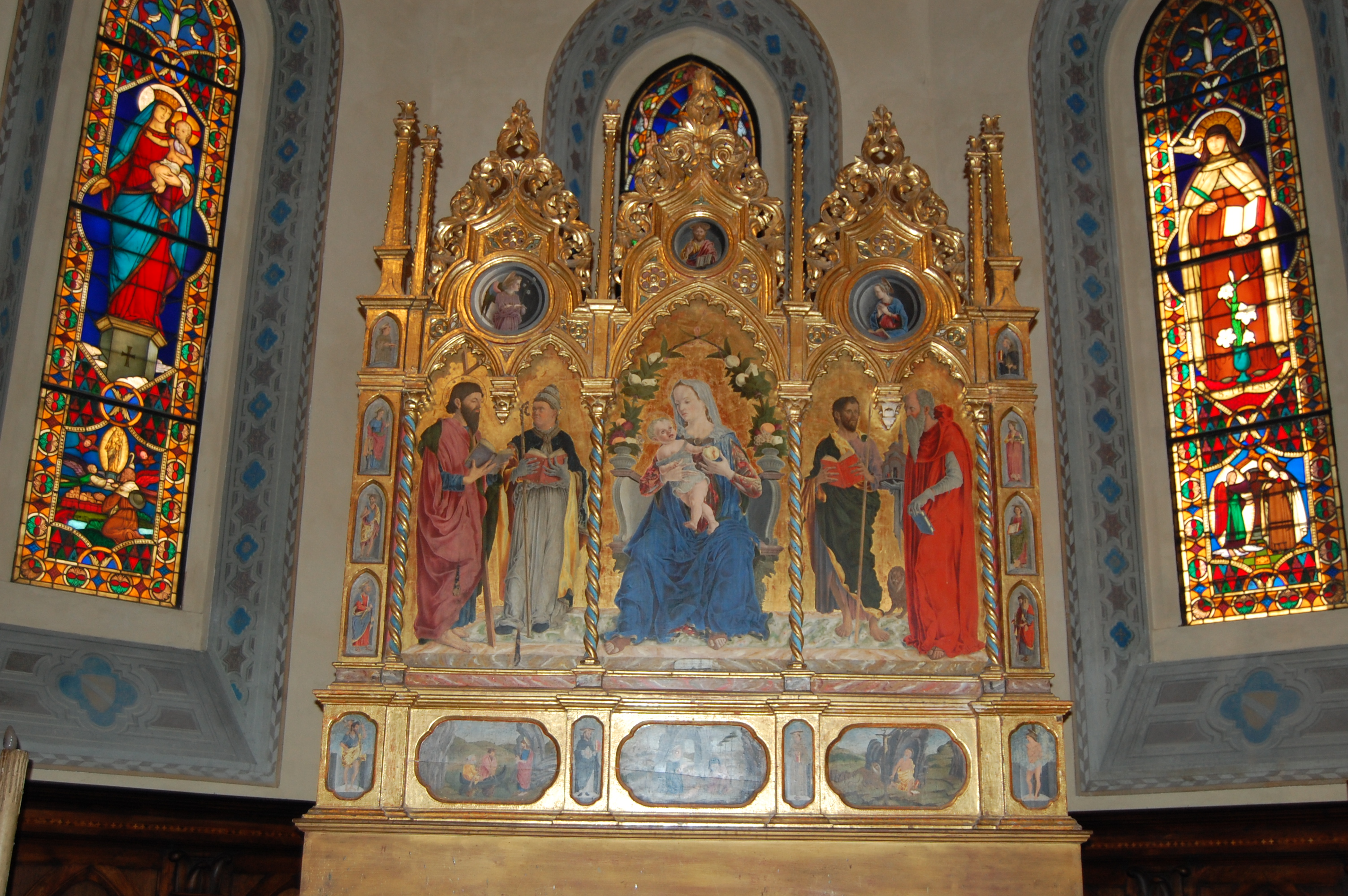 Retablo de Marco Zoppo en la capilla del Real Colegio de España en Bolonia (Italia).